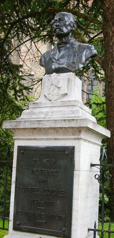 Karel Cogge - eigen foto